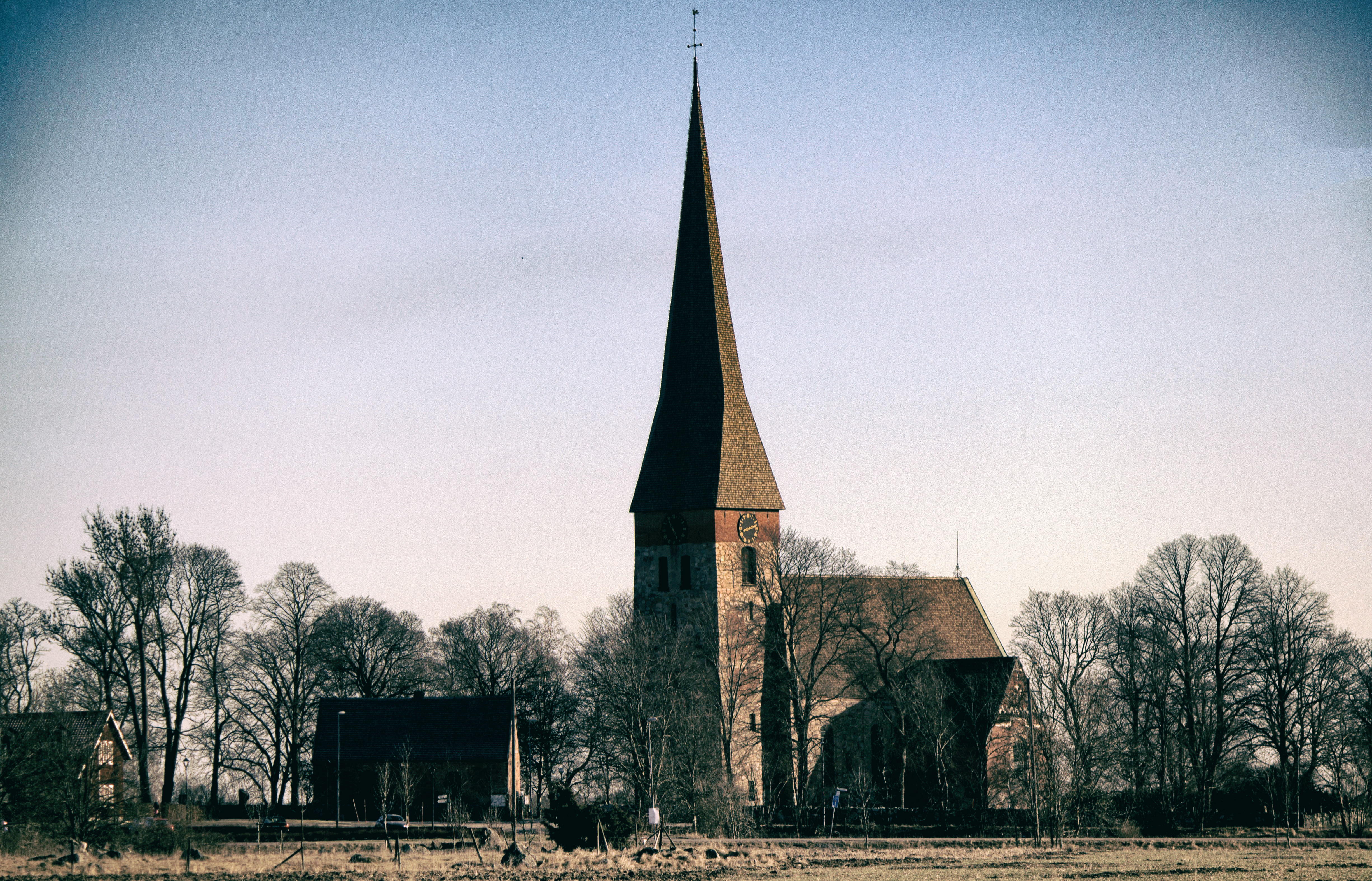 Vaksala kyrka är uppförd med murar av gråsten och tegel. Den har ett rektangulärt långhus i öst-västlig riktning och korsarmar i norr och söder. Koret är rakslutet. I norr ligger sakristian som är sammanbyggd med den norra korsarmen. Kyrkan har från början uppförts som en romansk gråstenskyrka med långhus, västtorn och smalare, absidförsett kor, sannolikt under 1100-talets senare del. Två ursprungliga romanska fönster, framtagna under 1900-talet, är synliga i form av nischer, utifrån i södra väggen och inifrån i norra väggen. Denna äldsta kyrka hade troligen platt brädtak eller öppen takstol.